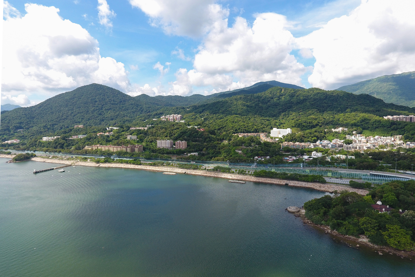 Tai Po Kau